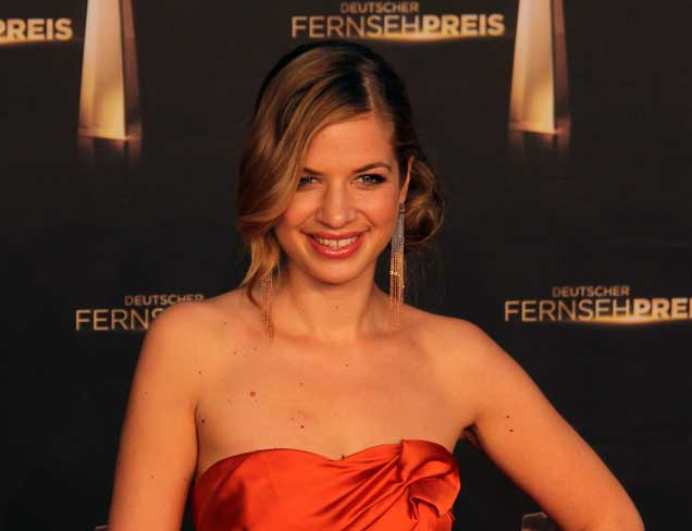 Susan Sideropoulos beim Deutschen Fernsehpreis 2012